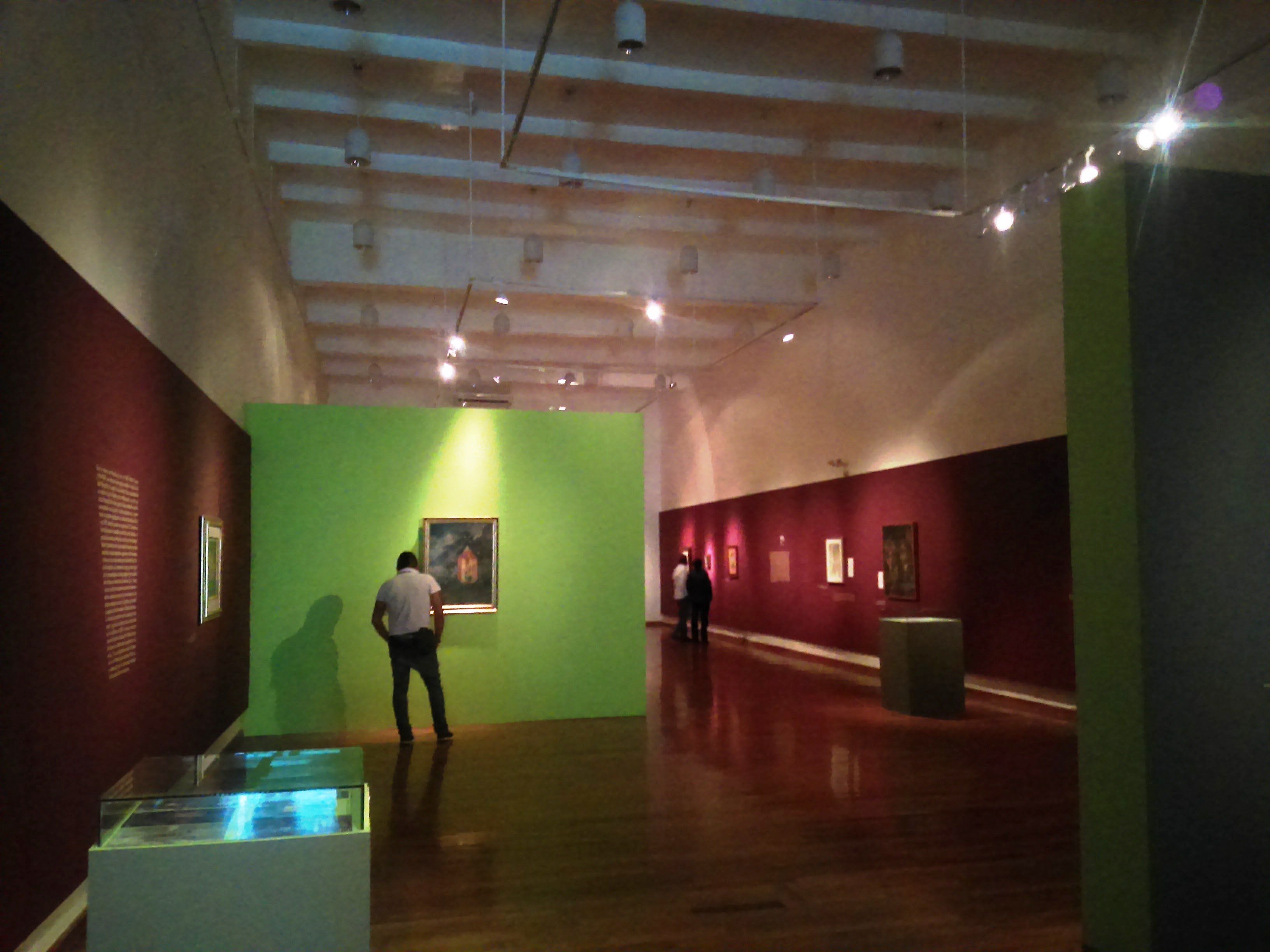 Exhibición temporal de Remedios Varo en el Cuartel del arte en Pachuca, México.